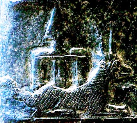 Particolare di un kudurru del re cassita Meli-Šipak II (XII sec. a.C.), raffigurante un drago con corna e una vanga appuntita, simboli del dio Marduk (conservata al Museo del Louvre di Parigi). La foto originale è File:Melischipak_kudurru_sb22_mp3h9113.jpg.